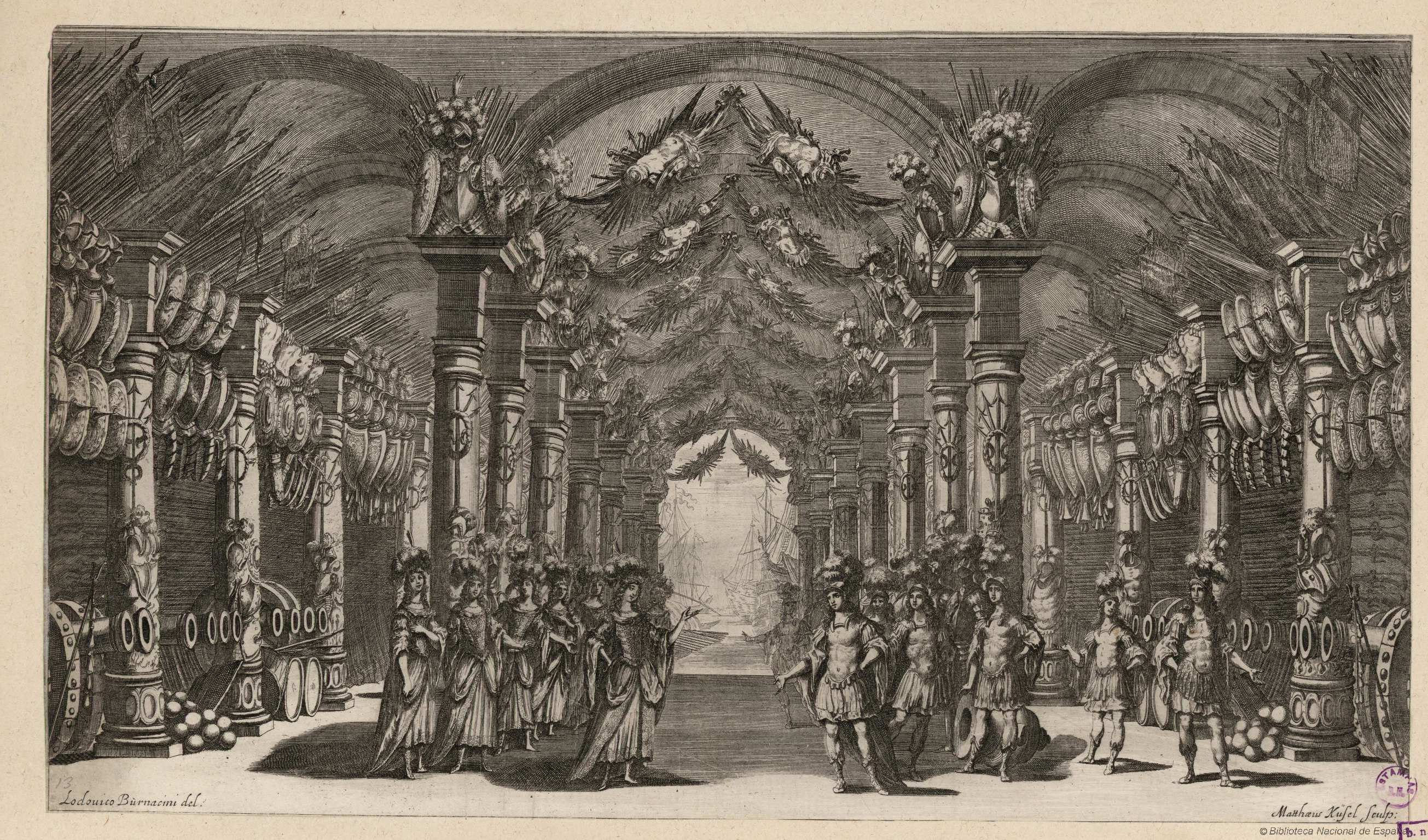 Arsenal de Marte. Aguafuerte y buril de Mathäus Küsel por diseño de Ludovico Ottavio Burnacini para la obra de Francisco Sbarra, "Il pomo d'oro. Festa teatrale rappresentata in Vienna per l'augustissime noze delle Sacre Cesaree e Reali Maestà di Leopoldo e Margherita", Viena, 1668. Ópera musicada por Antonio Cesti. Firma: "Lodouico Burnacini del. ; Matthaeus Küsel Sculp:". Biblioteca Nacional de España.